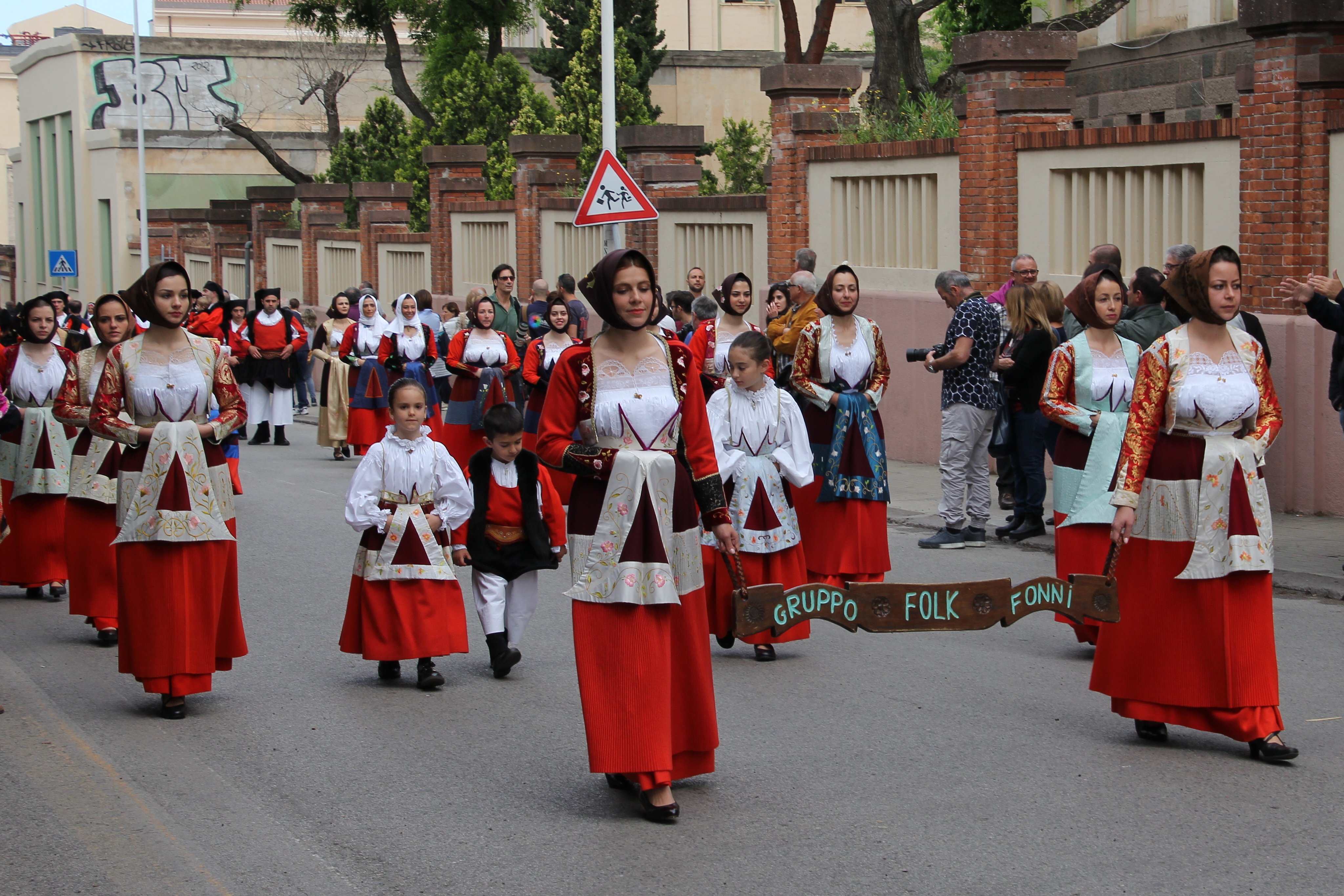 Cavalcata sarda 2018, Sassari, Sardinia, Italy